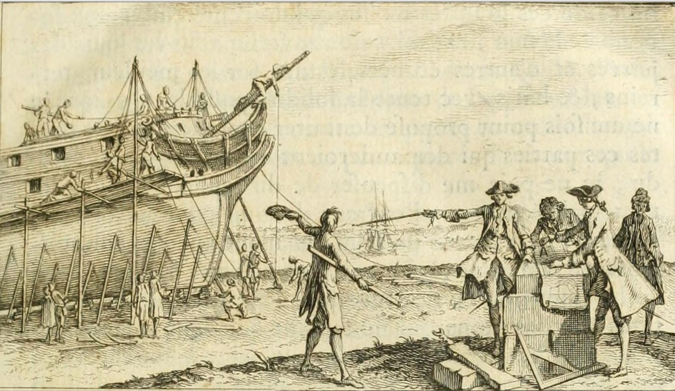 Dessin réalisé en 1752 pour la première édition de Éléments de l'architecture navale ou Traité pratique de la construction des vaisseaux. Ouvrage de Duhamel du Monceau.